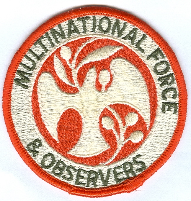 Badge/embleem Multinational Force and Observers